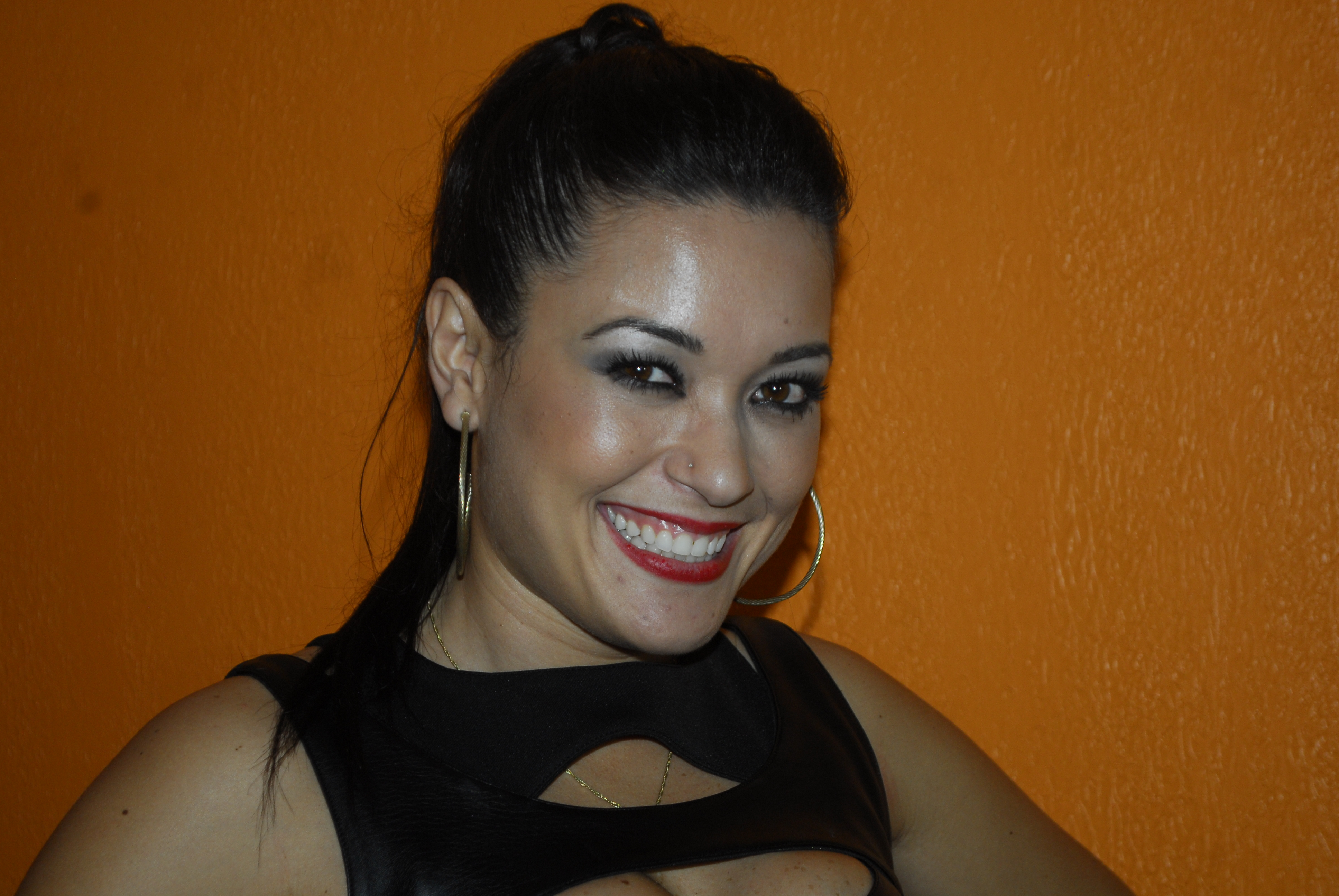 Milene Uehara integrante do Programa do Ratinho.